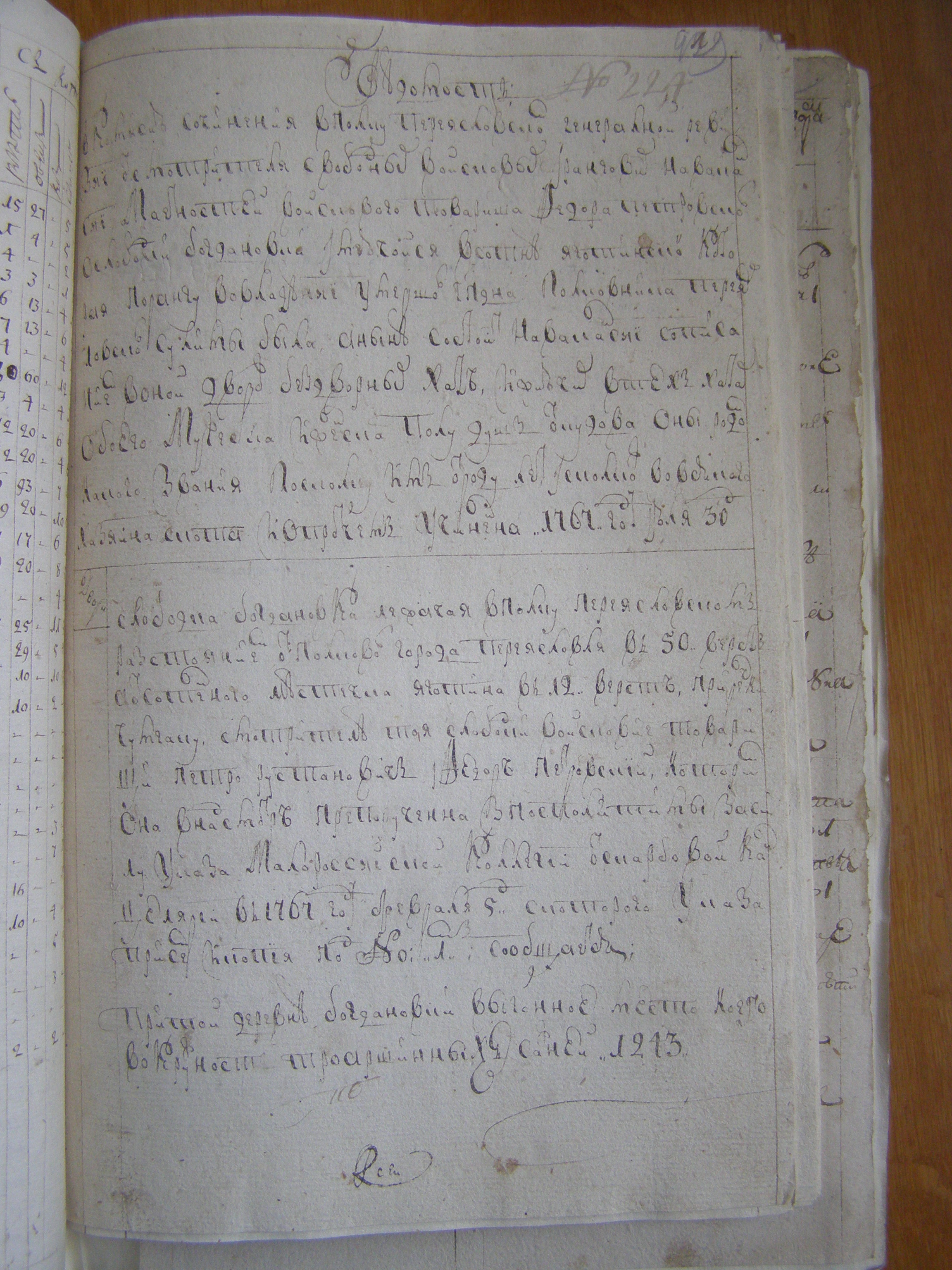 Ведомость генеральной ревізії